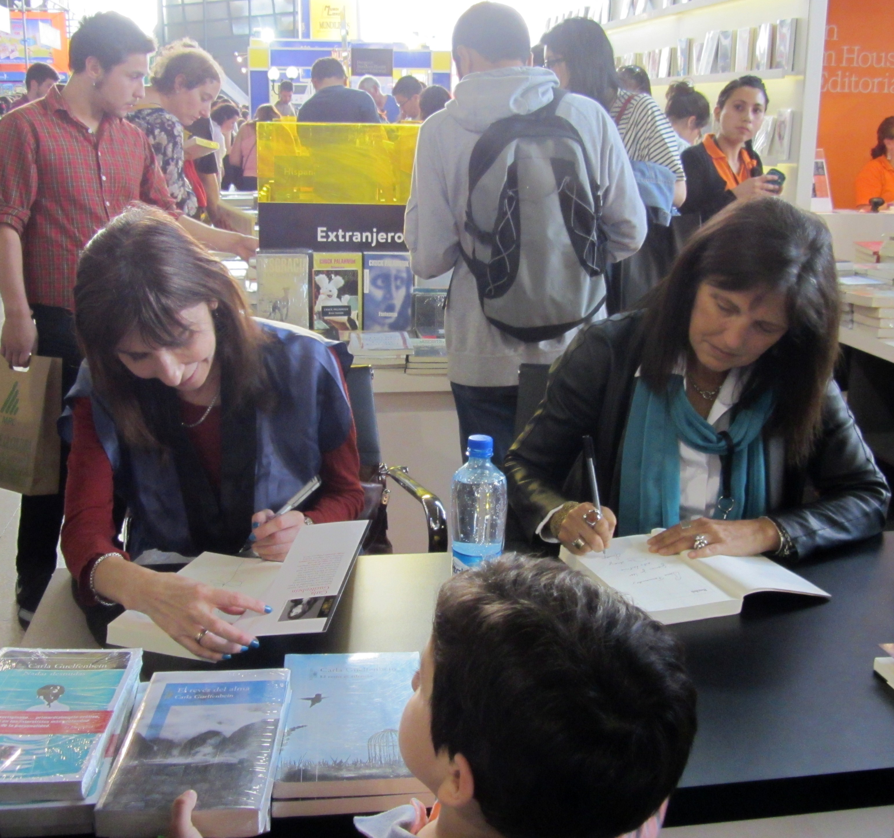 Las escritoras Carla Guelfenbein (Chile) y Claudia Piñeiro (Argentina) en la Feria Internacional del Libro de Santiago 2015